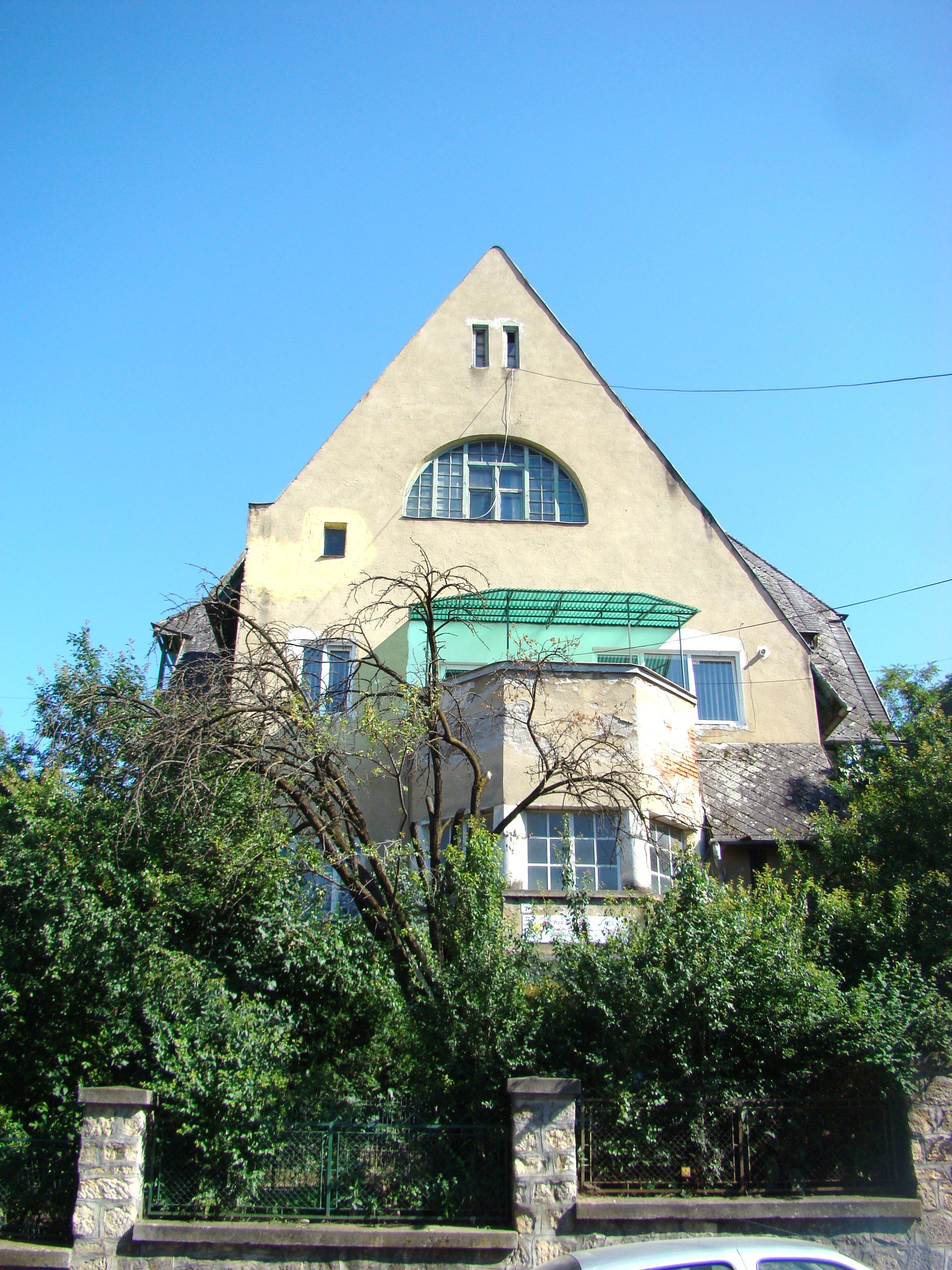 Clădire monument istoric, Str. Zrinyi 7